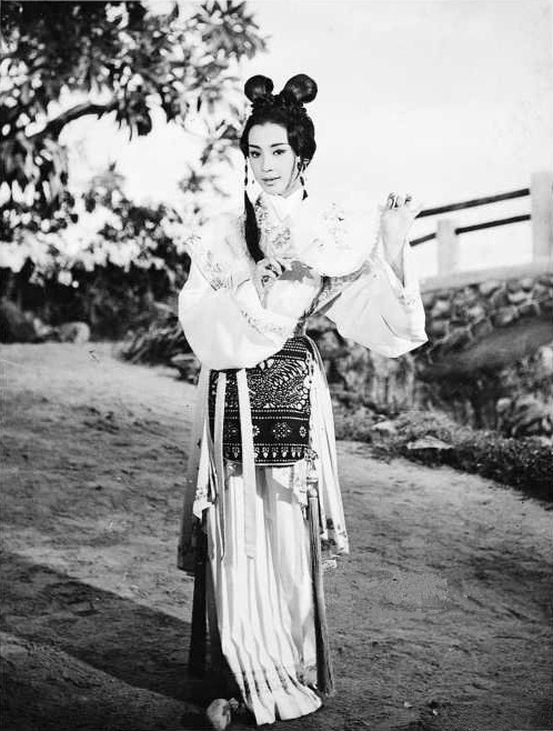 江青在电影《七仙女》（李翰祥导演）中的剧照